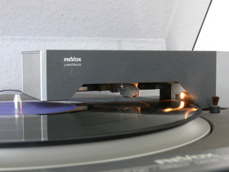 Es un tocadiscos de tipo: exploración tamgencial.